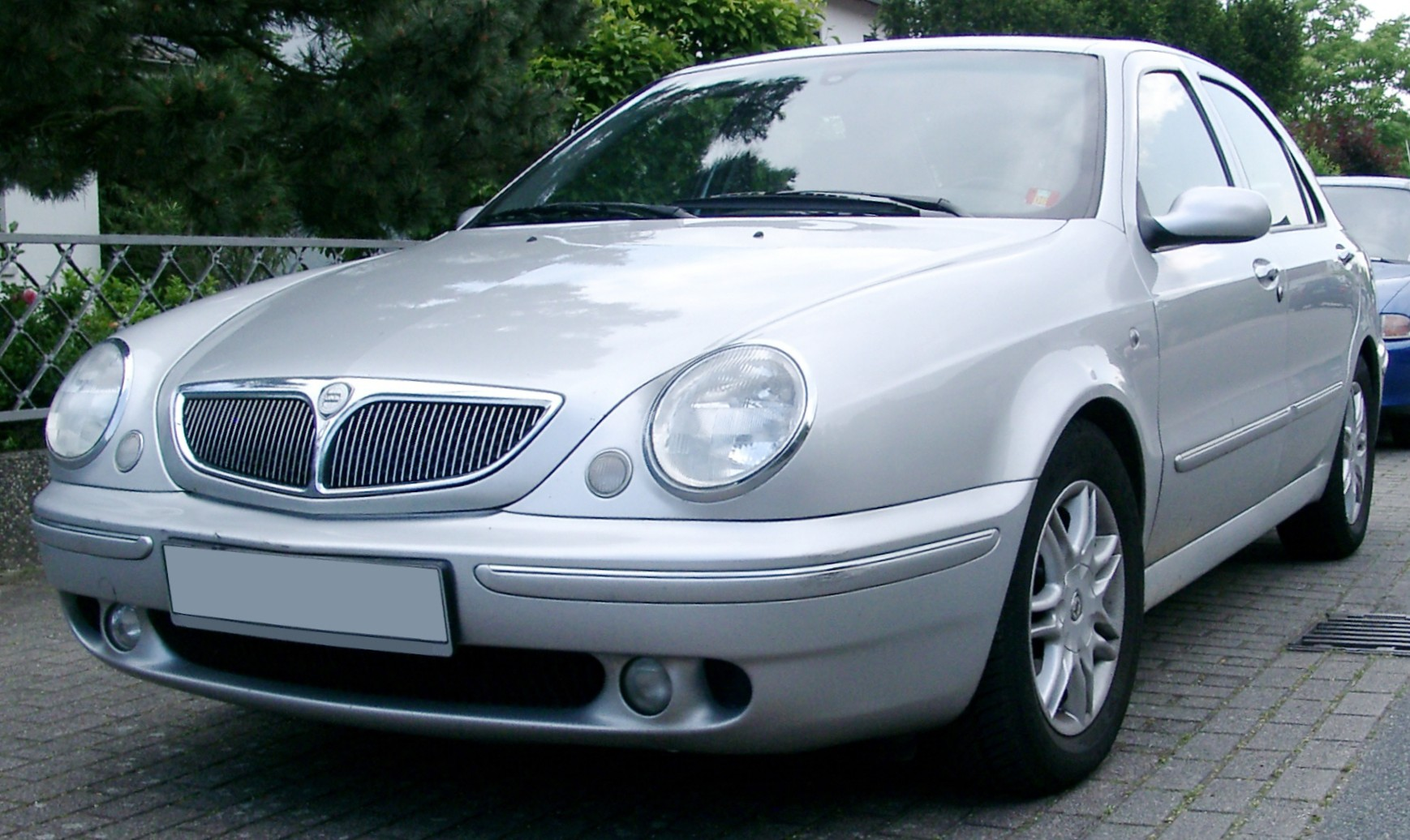 Lancia Lybra Limousine